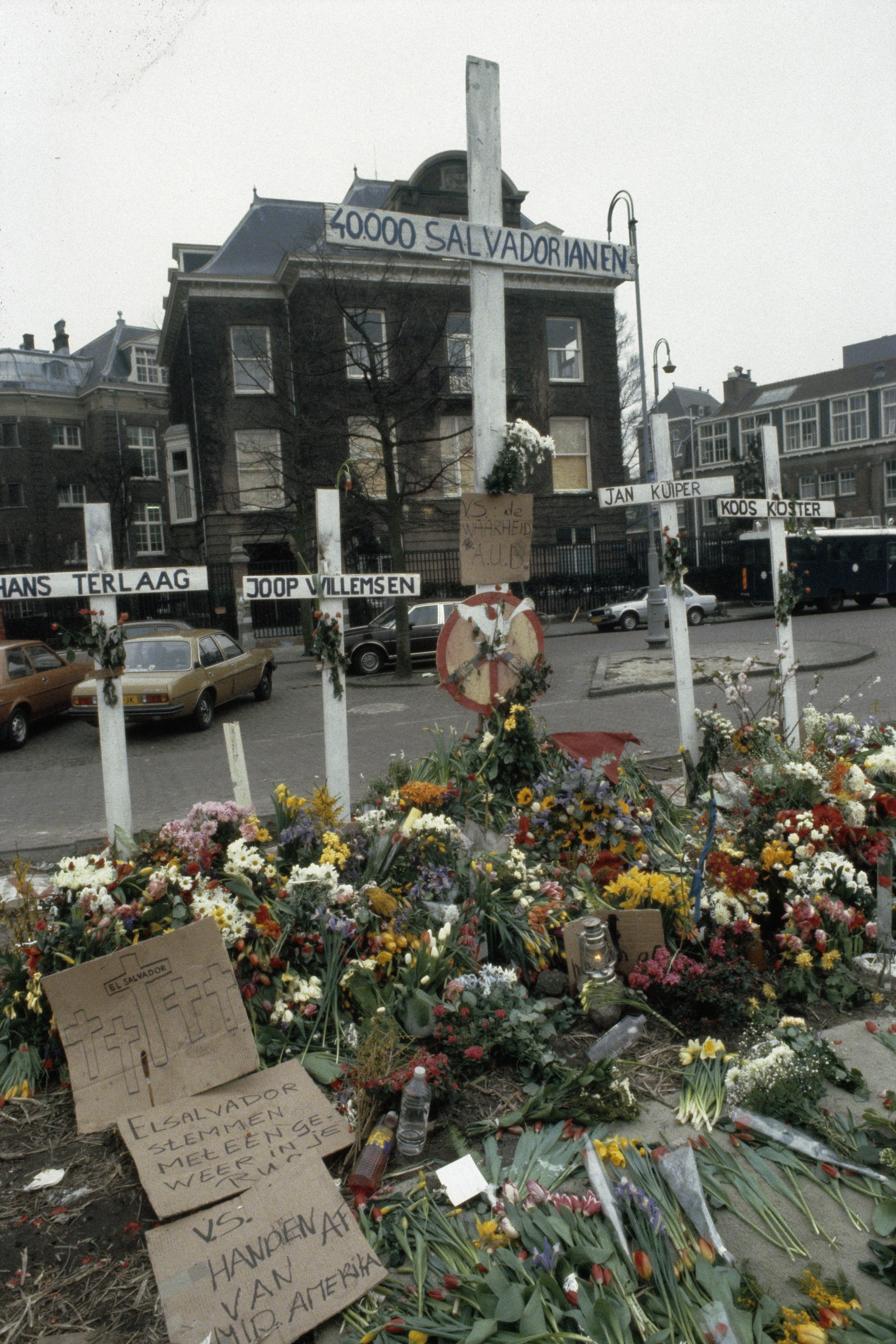 Soort ereplaats aan het Museumplein in Amsterdam waar 5 kruisen zijn geplaatst, 4 voor de omgekomen Nederlandse journalisten in El Salvador (Koos Koster, Hans ter Laag, Jan Kuiper en Joop Willemsen) en 1 voor de 40.000 vermoorde mensen in El Salvador.